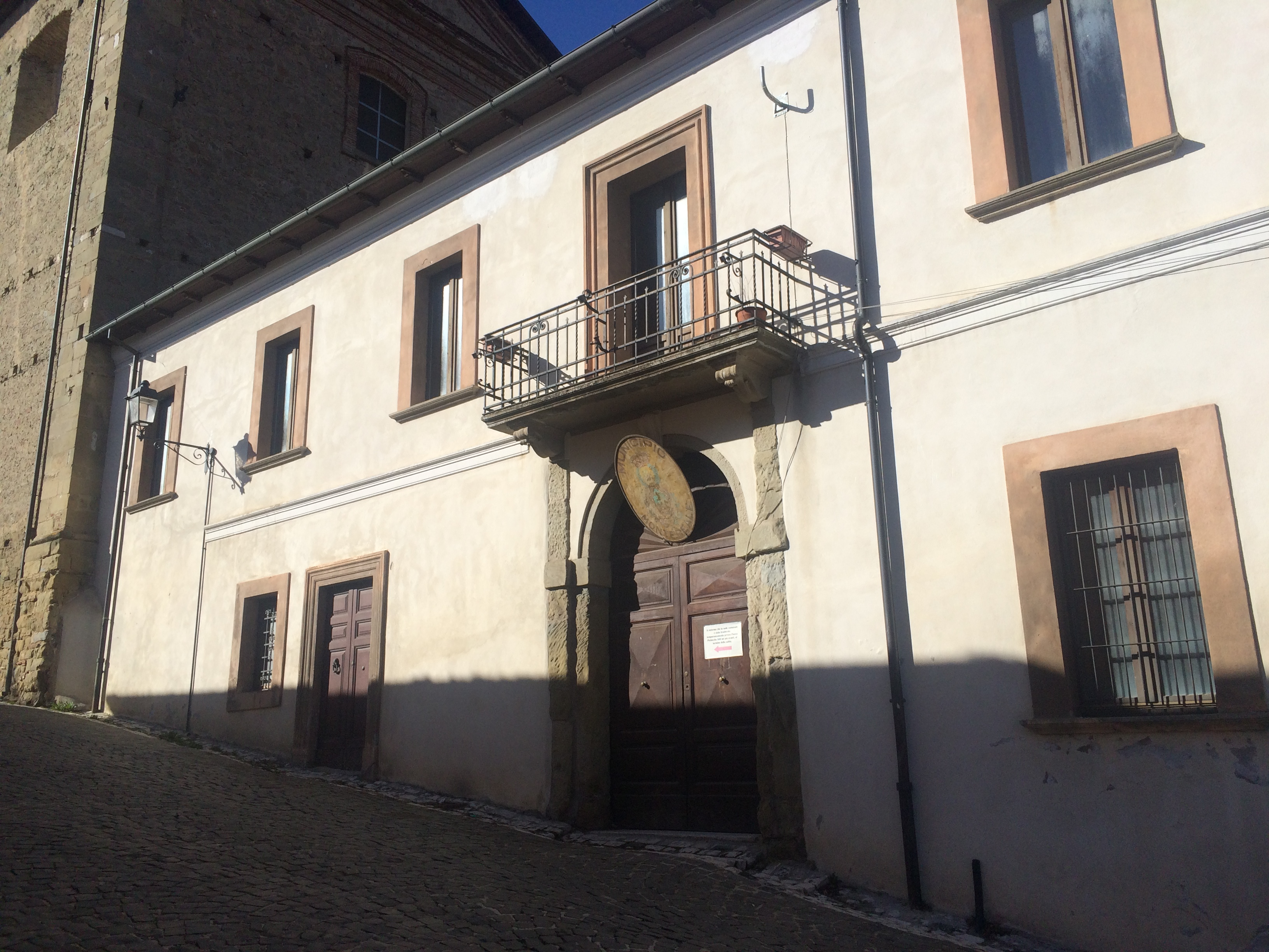 Il palazzo del Municipio a Montereale (AQ).